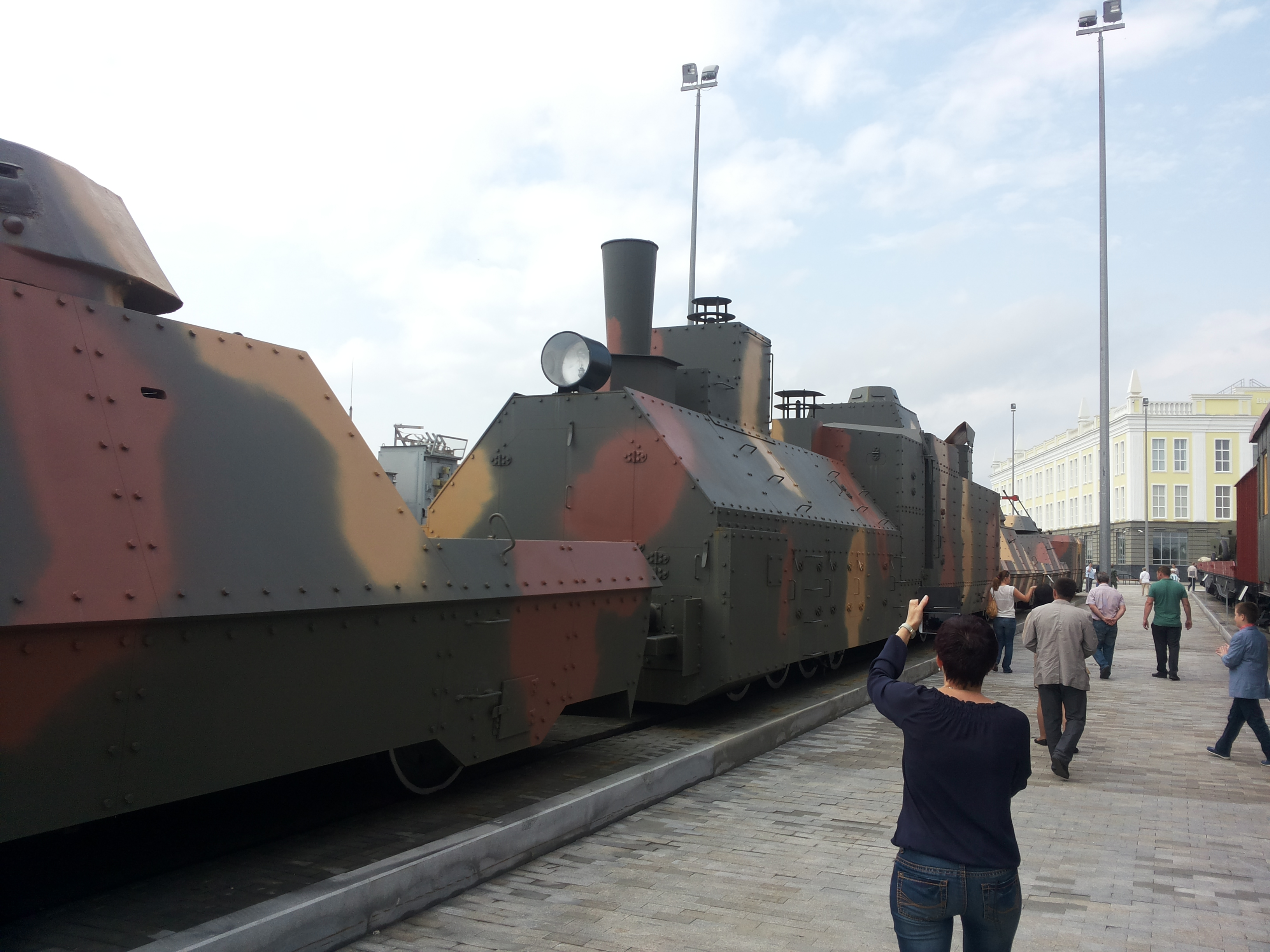 Музей военной техники «Боевая слава Урала»